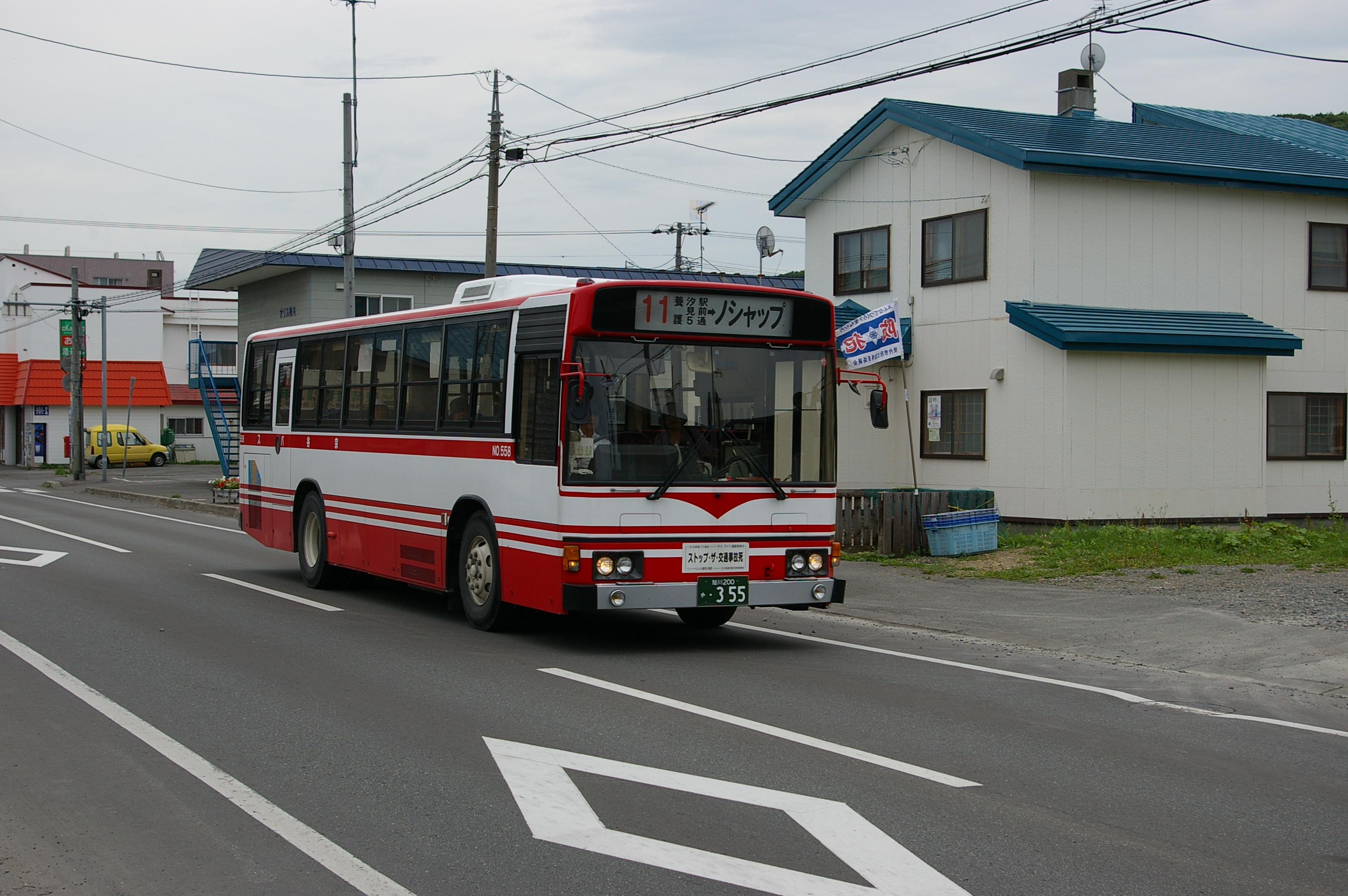 regular route Bus, SOUYA Bus